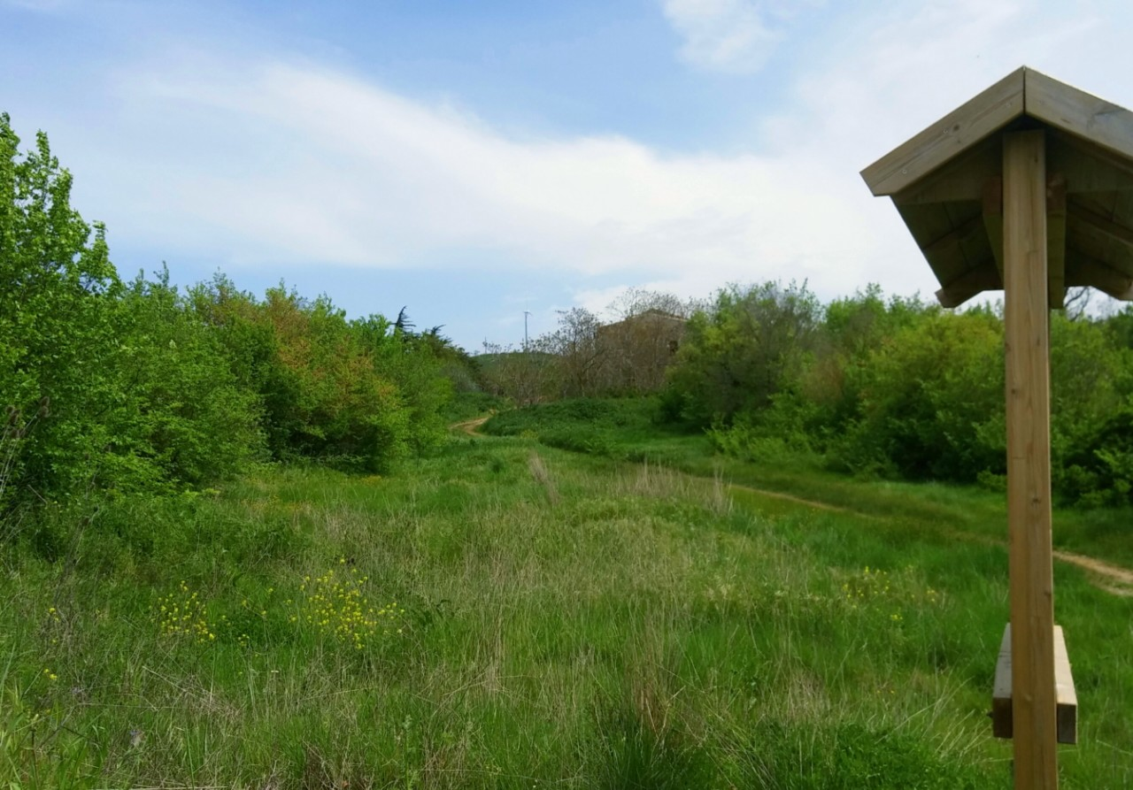 Tratturello Camporeale-Foggia c/o Tre Fontane (Greci, Italy)